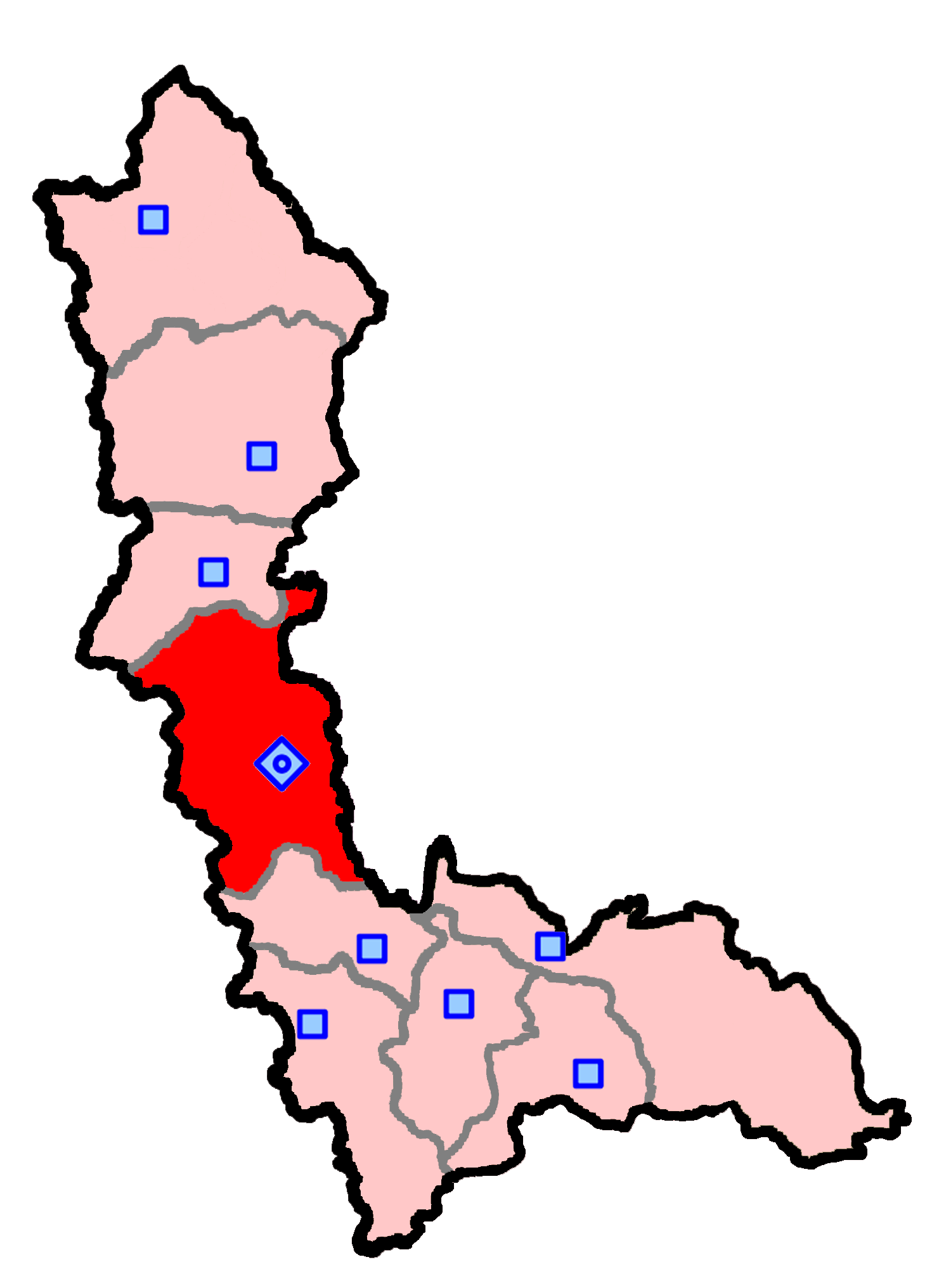 حوزهٔ انتخاباتی ارومیه برای انتخابات مجلس شورای اسلامی